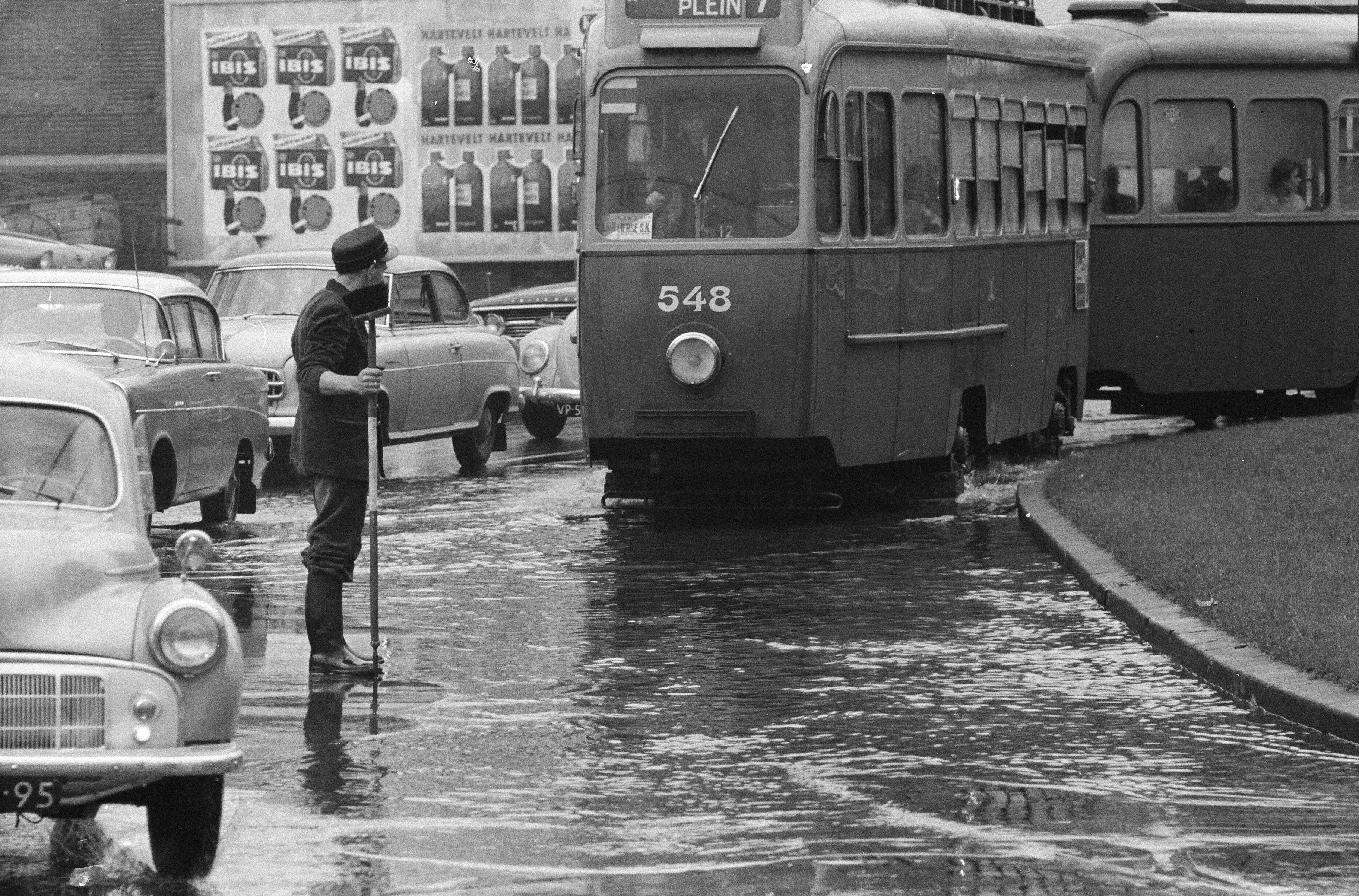 Collectie / Archief : Fotocollectie Anefo Reportage / Serie : [ onbekend ] Beschrijving : Wolkbreuk boven Amsterdam, trams ondervinden moeilijkheden op het Weteringcircuit Datum : 12 augustus 1960 Locatie : Amsterdam, Noord-Holland Trefwoorden : trams, verkeer, weer Fotograaf : Pot, Harry / Anefo Auteursrechthebbende : Nationaal Archief Materiaalsoort : Negatief (zwart/wit) Nummer archiefinventaris : bekijk toegang 2.24.01.05 Bestanddeelnummer : 911-4962